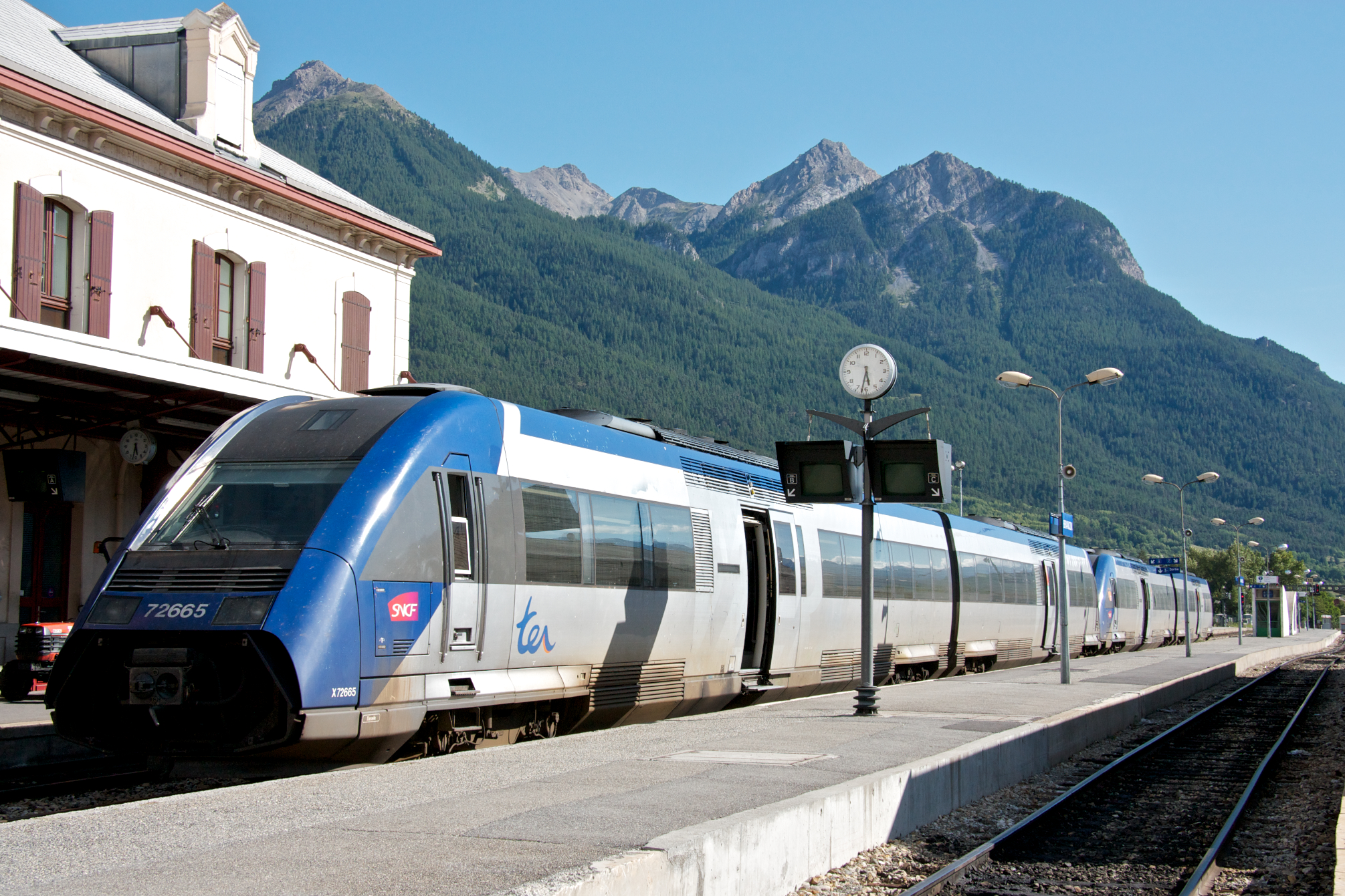 le train Régional TER 17428 [Briançon - Marseille] quelques minutes avant le départ. Tipo: Comboio Regional 17428 [Briançon - Marseille] Local: Estação de Briançon [linha TER Provence-Alpes-Côte d'Azur] Data e hora: 24 de Julho de 2011 [17h33] Material: Automotora X72665 e X72xxx [Unidades Múltiplas Diesel]